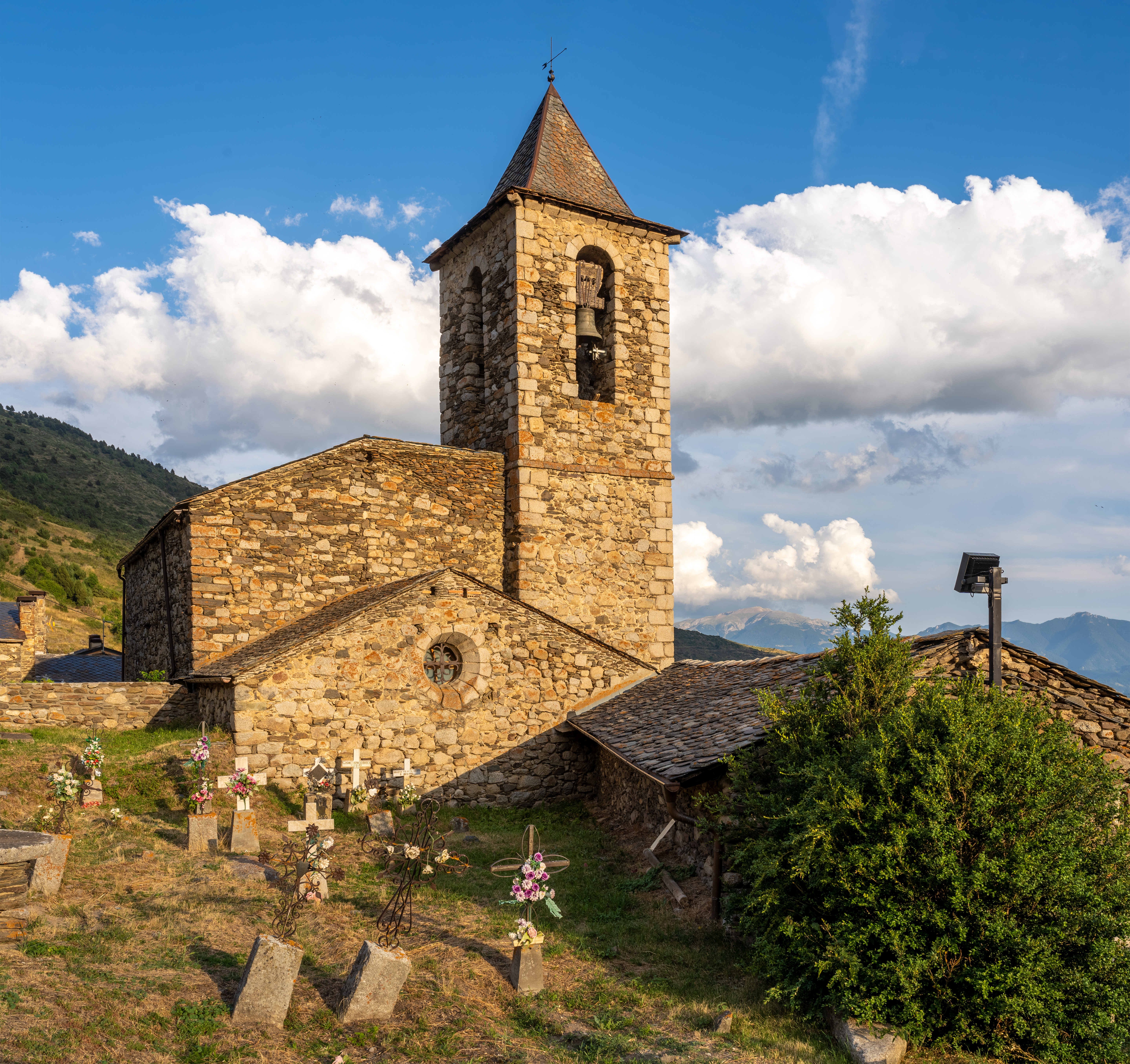 Església parroquial de Sant Serni, o Sant Sadurní, a Meranges (Baixa Cerdanya)